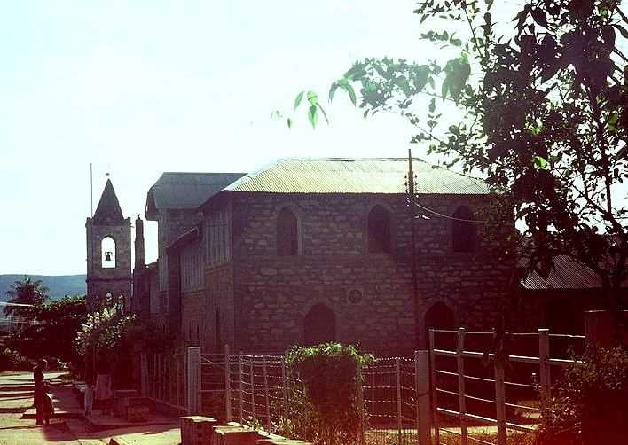 Misión de Santa Elena de Uairén, Estado Bolívar, Venezuela